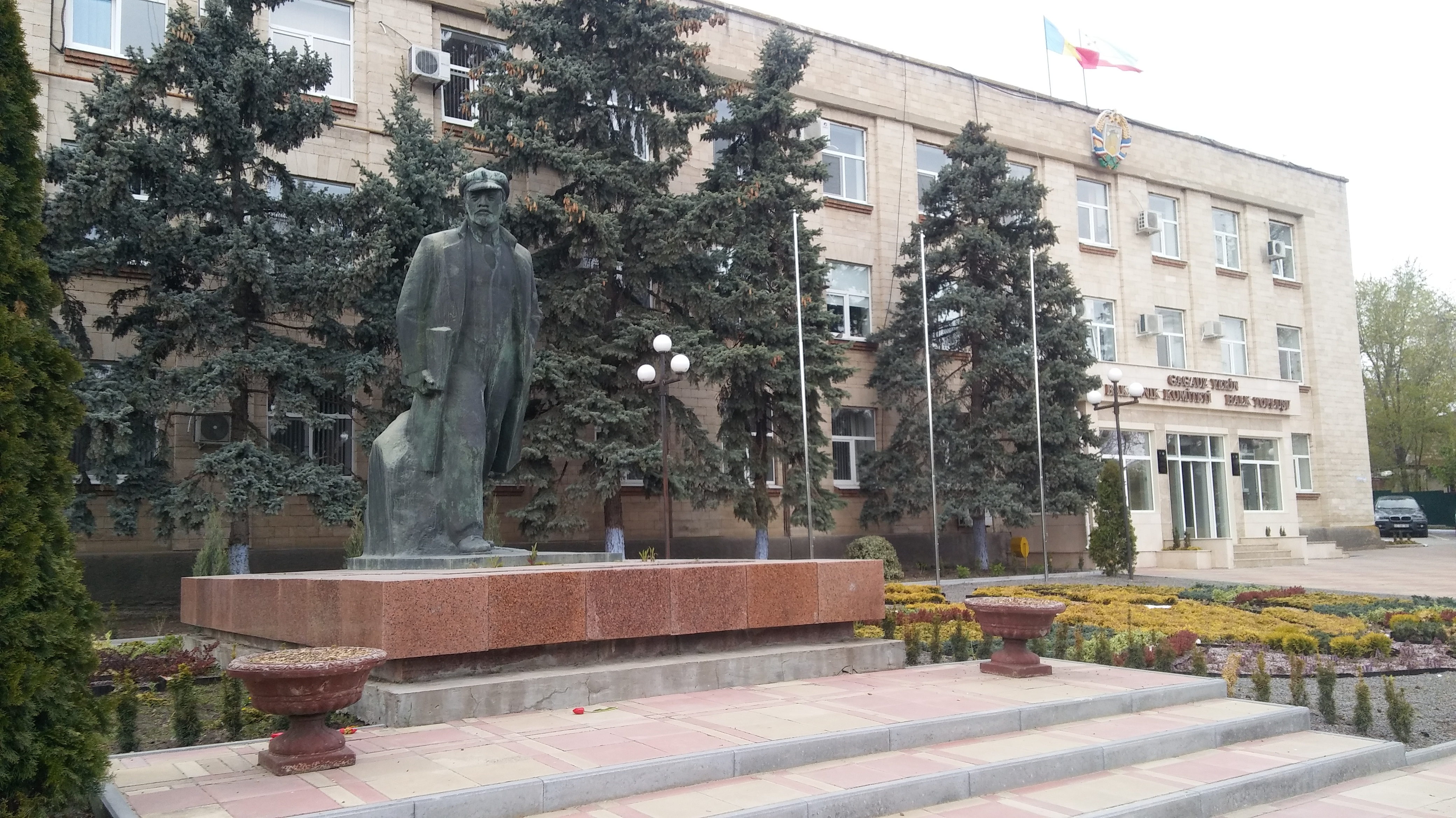 Lenin statue in Comrat 2017